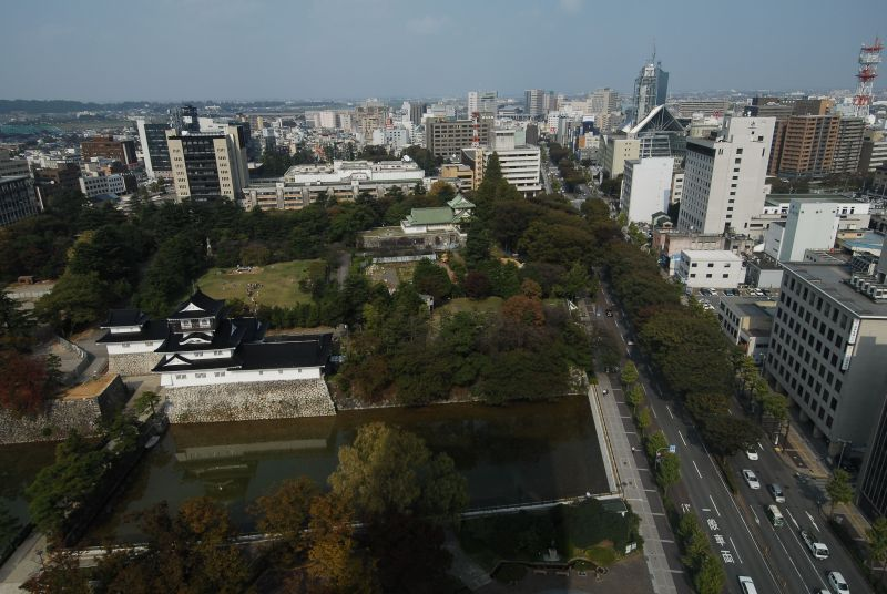 Toyama ANA Hotel.